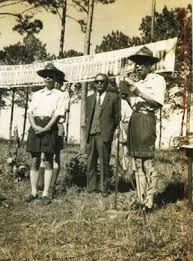 Huynh trưởng Võ Đình Cường đọc lời khai mạc